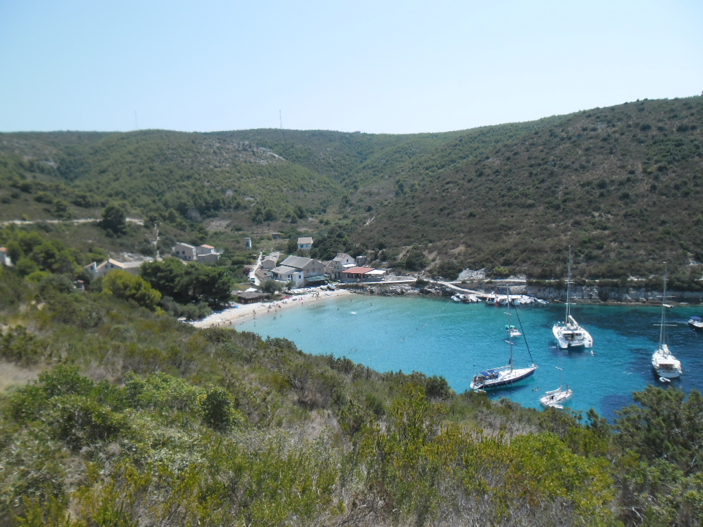 Porat na otoku Biševu